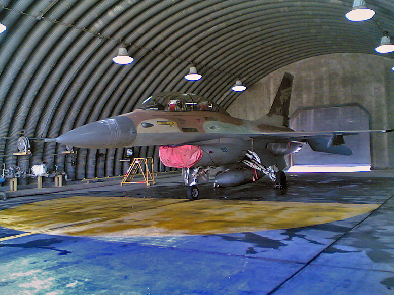 IAF F-16B '993' of the 116th squadron standing in a Hardened Aircraft Shelterמטוס F-16 של חיל האוויר הישראלי מטייסת 116 בתוך דיר תת-קרקעי